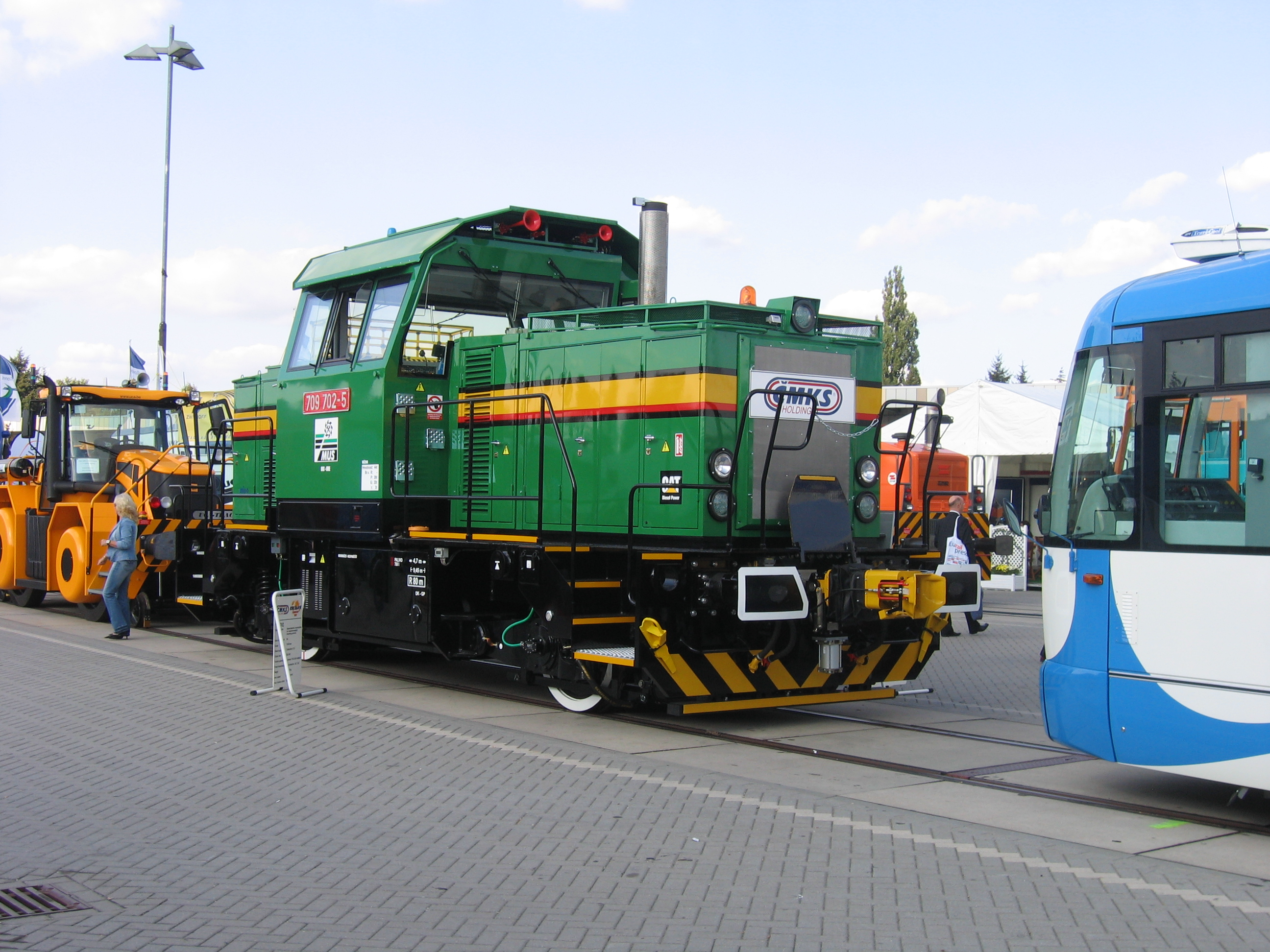 CMKS 709.702 shunter Innotrans 2006, Berlin 20 sep 2006